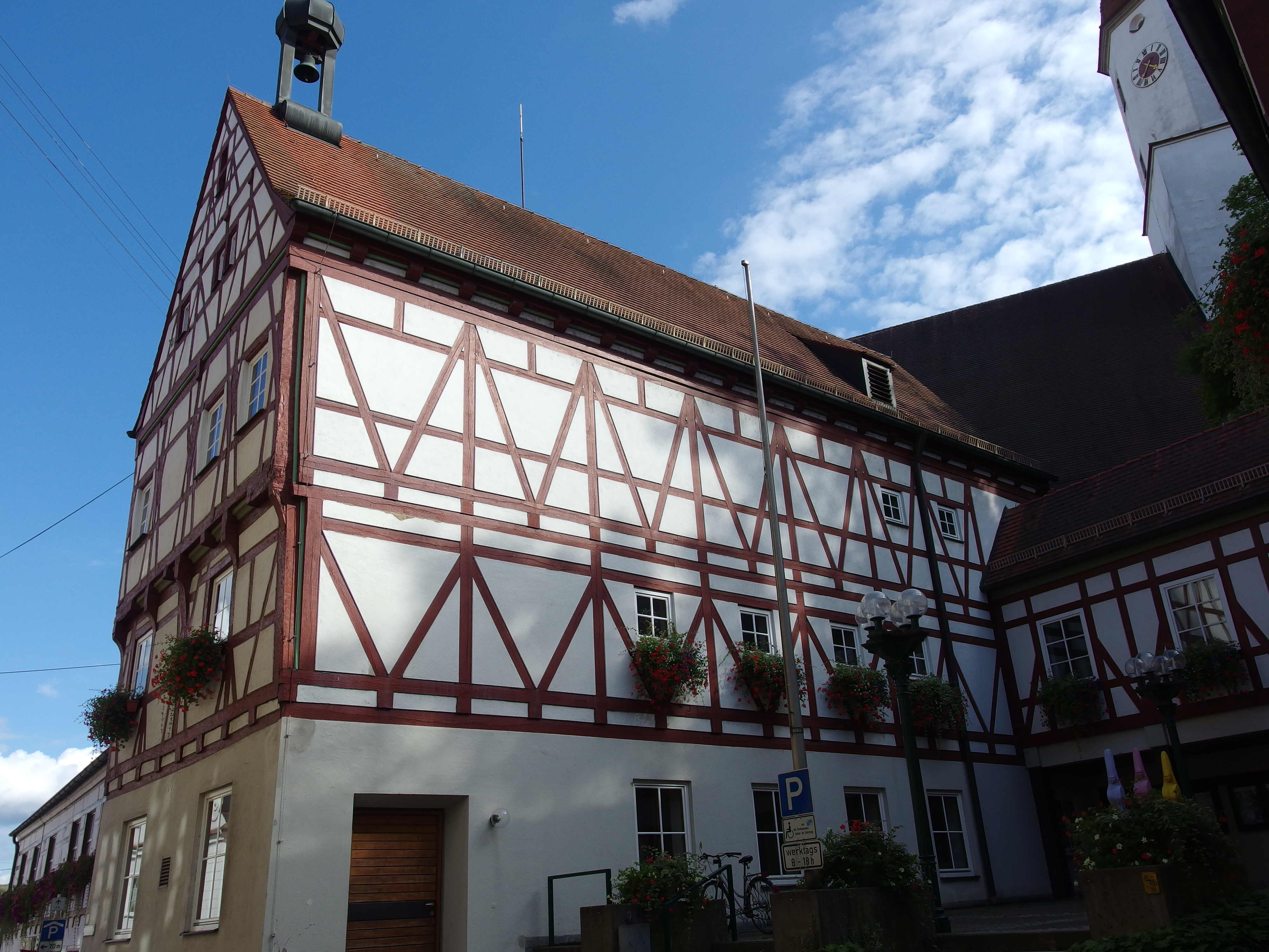 Harburg -Stadt-Schlossstr-1, Rathaus Osttrakt Fachwerkfassade Hofbereich und Nordgiebel,This is a photograph of an architectural monument.